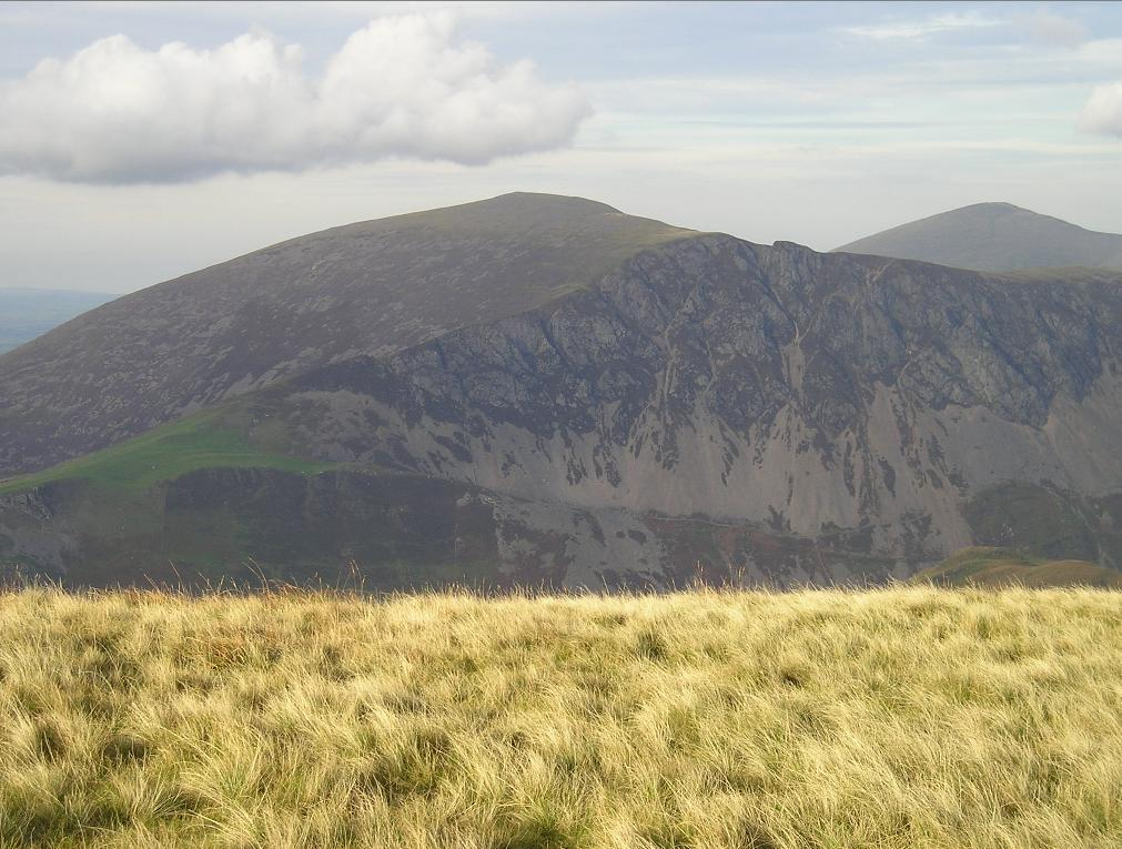 Mynydd Mawr from Trum y Ddysgl